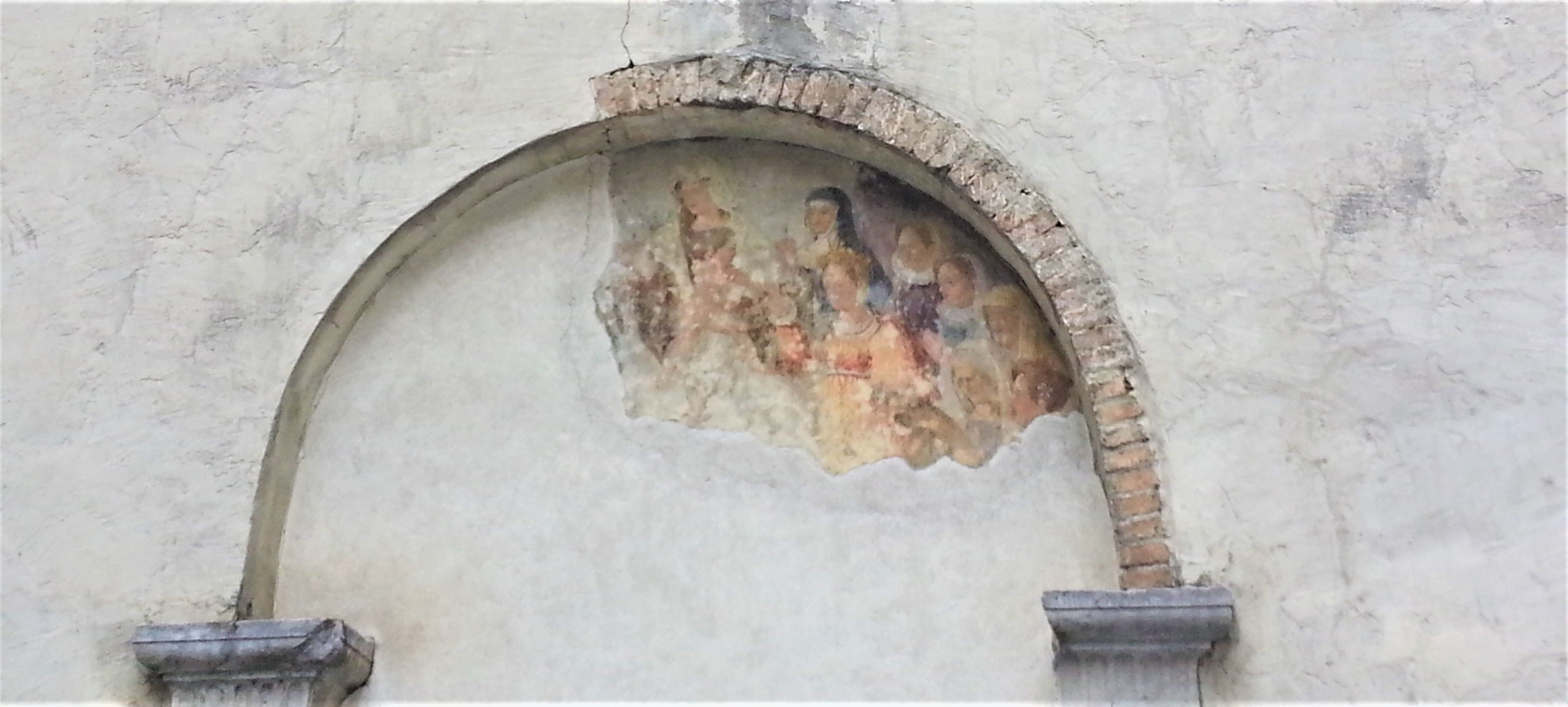 Affresco murale posto sulla porta di entrata alla chiesa dell'ex monastero di santa Caterina risalente al 1522 raffigurante santa Chiara, santa Caterina d'Alessandria con devoti